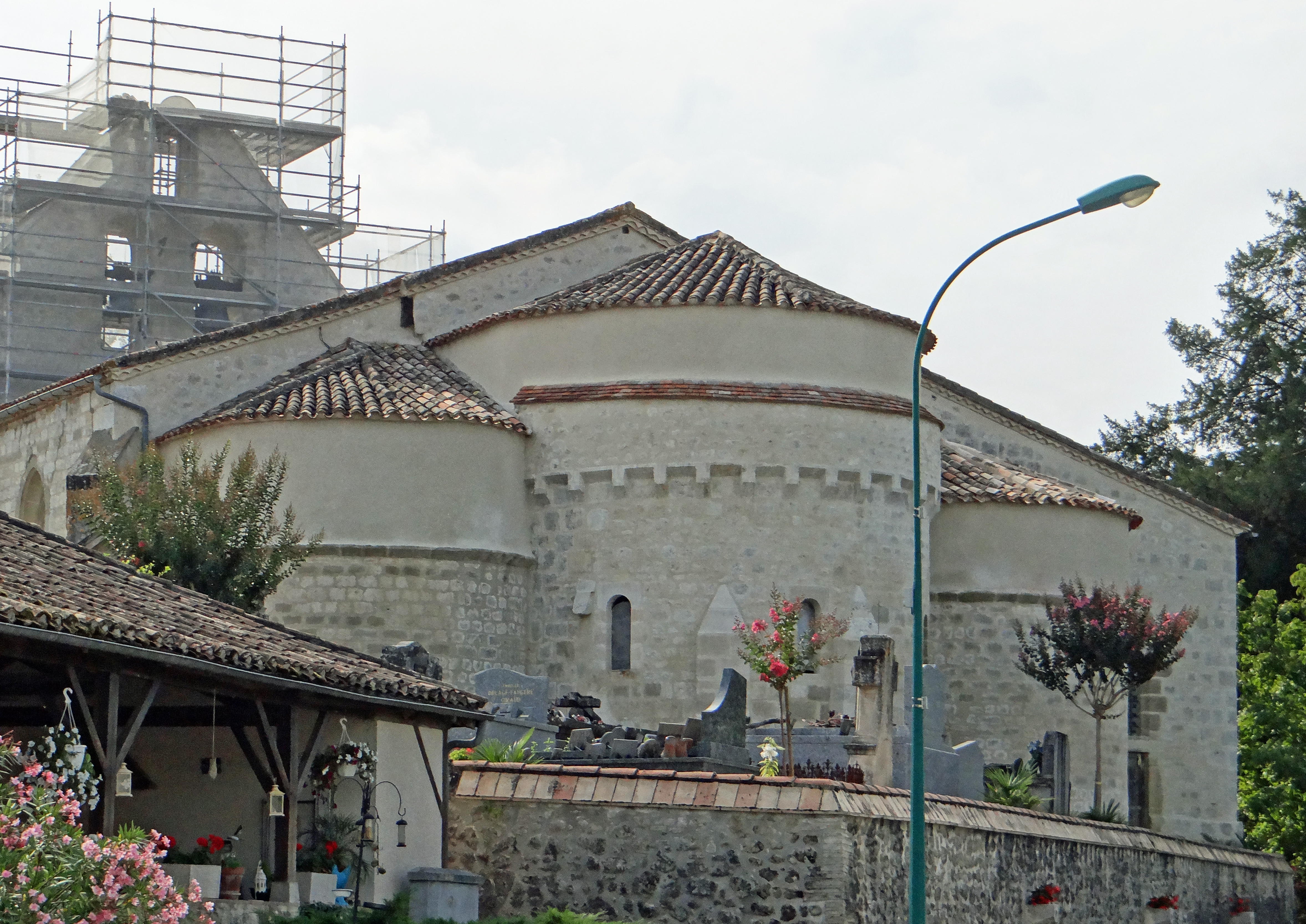 Saint-Colomb-de-Lauzun - Église Saint-Colomban - Chevet et clocher en cours de restauration